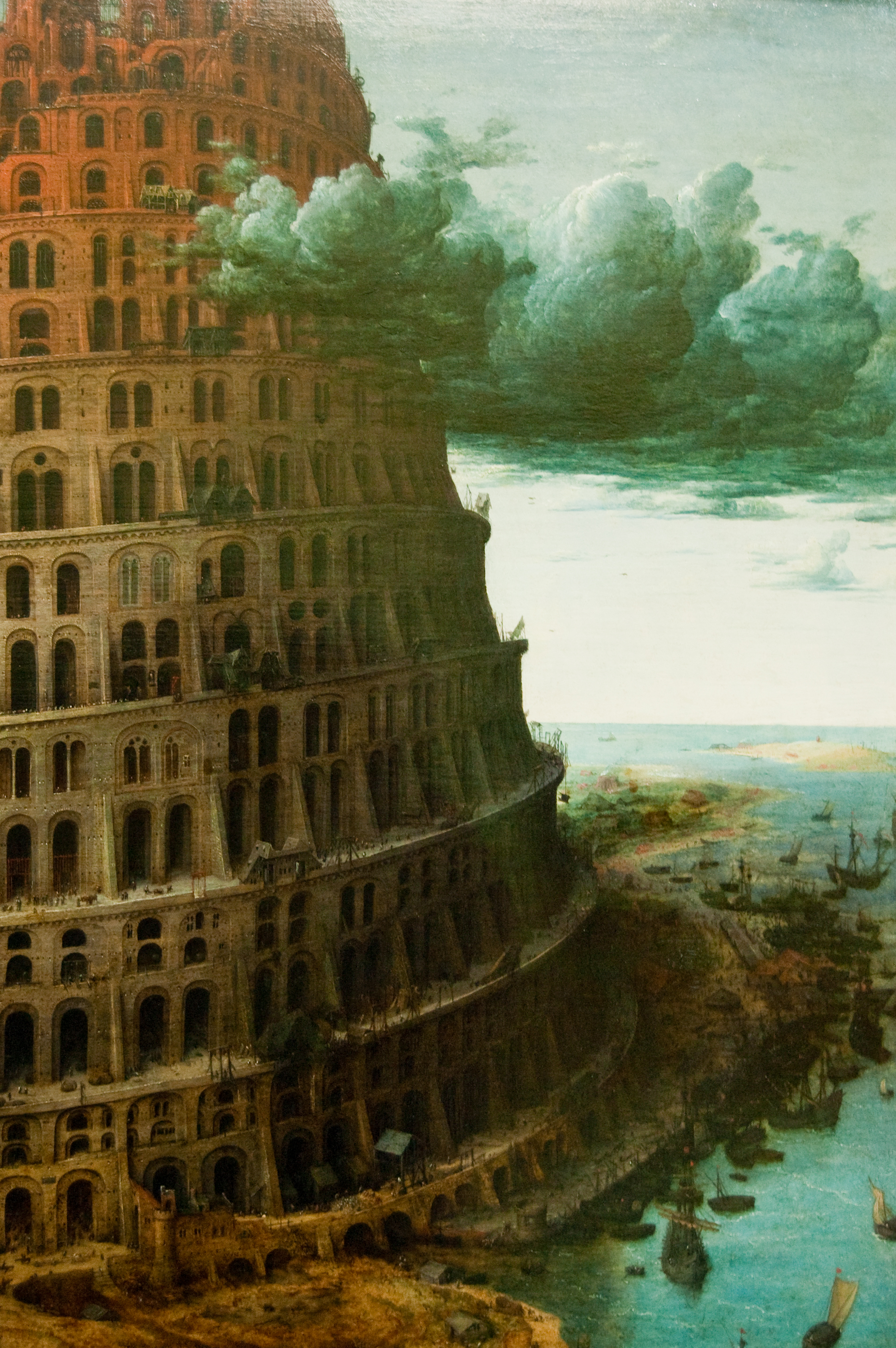 Toren van Babel, Bruegel (Collectie 15de-17de eeuw, zaal 6) Tower of Babel - detail